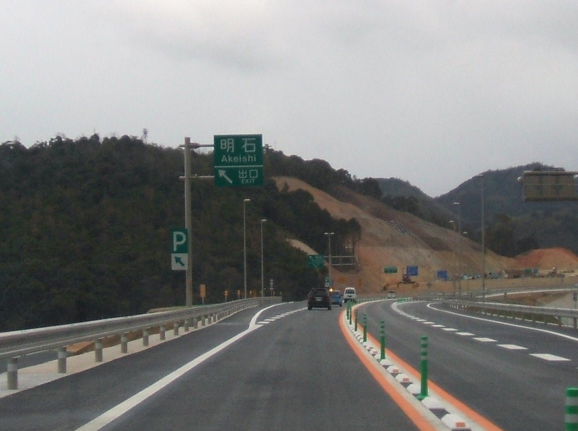 Hagi-Misumi road Akeishi-IC,Hagi,Yamaguchi-pref,Japan